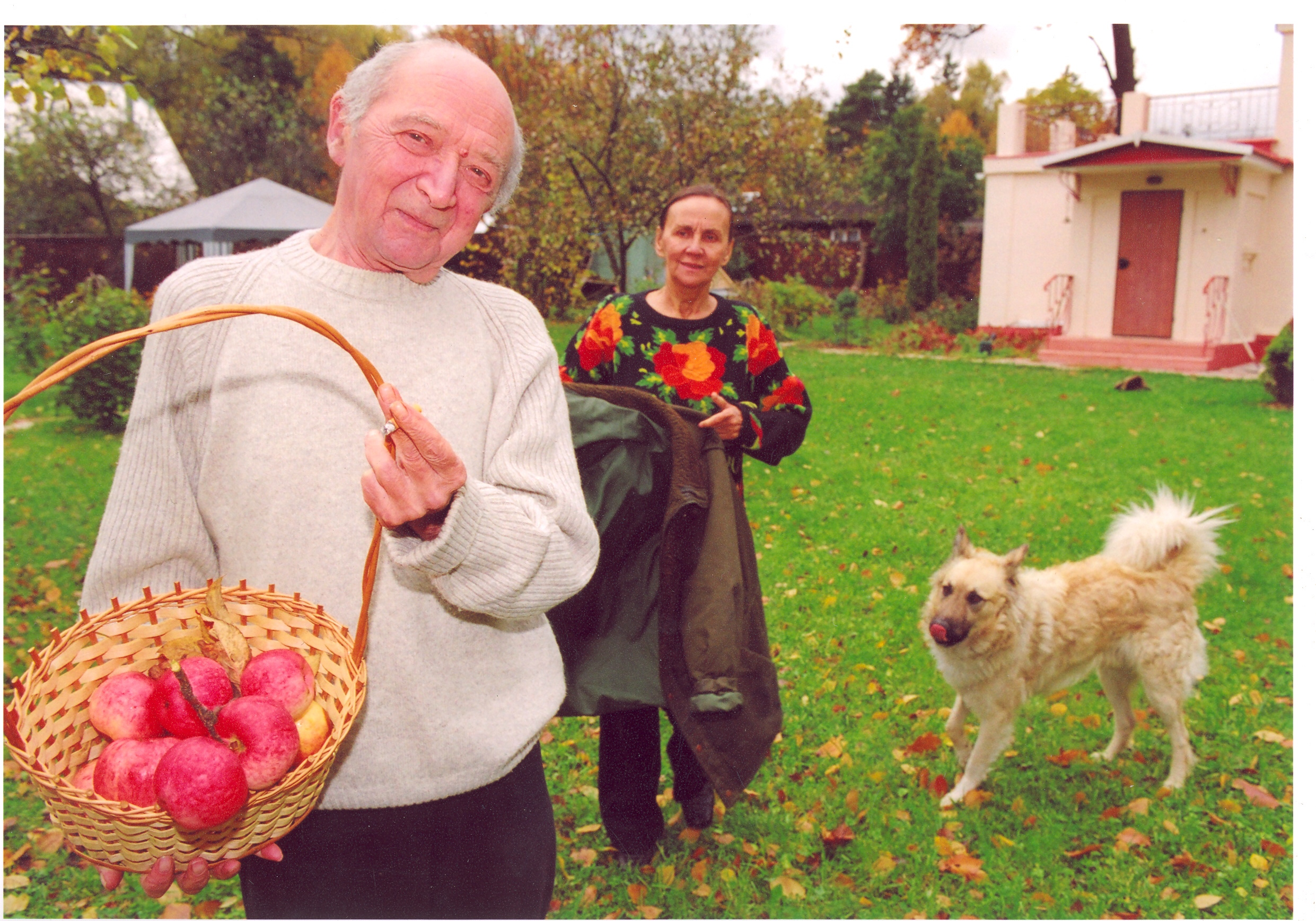 С женой и собакой в своем загородном доме.